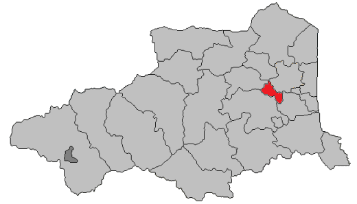 Canton de Toulouges dans le département des Pyrénées Orientales